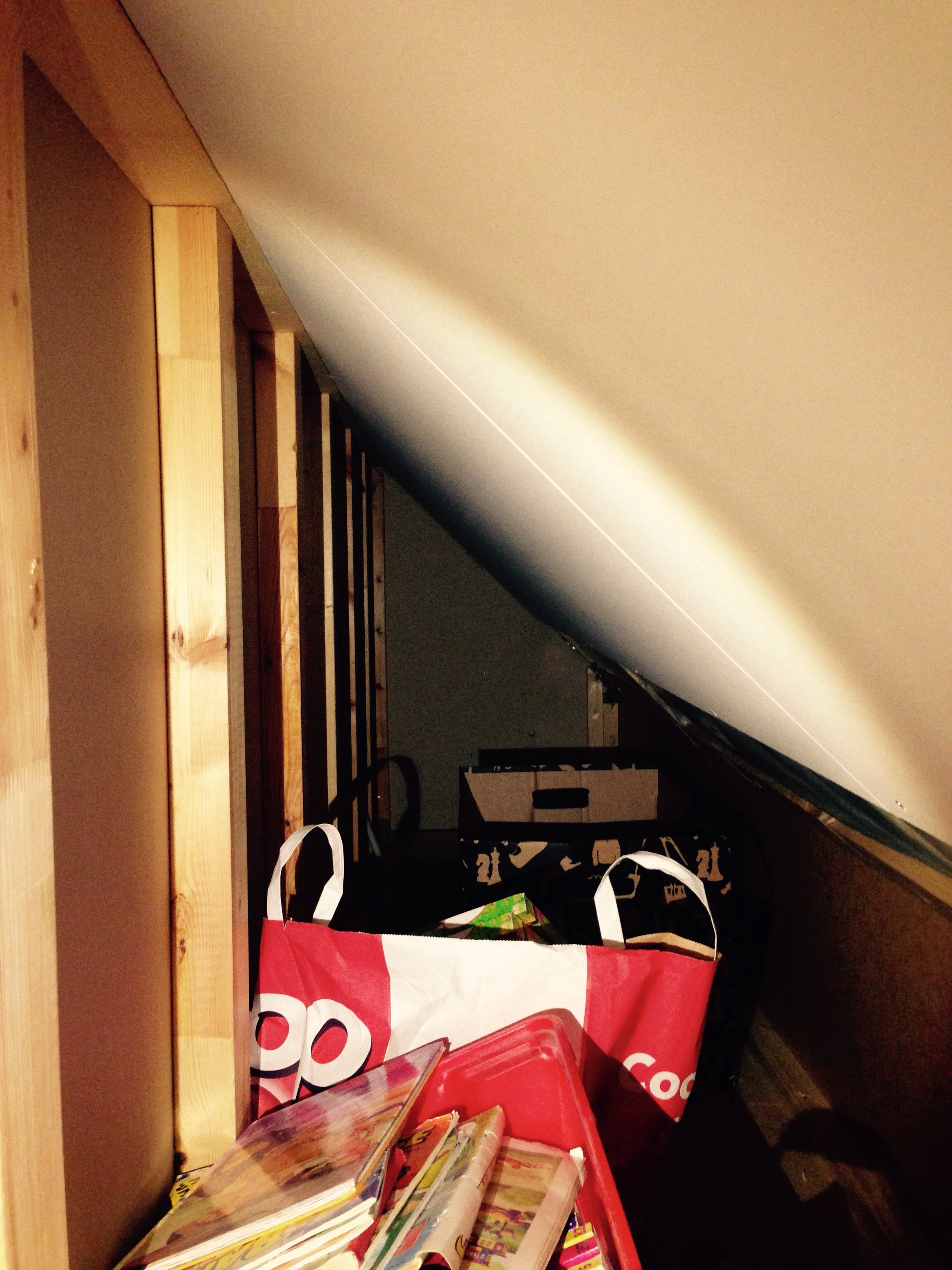 Kattvind med diverse sparade saker.